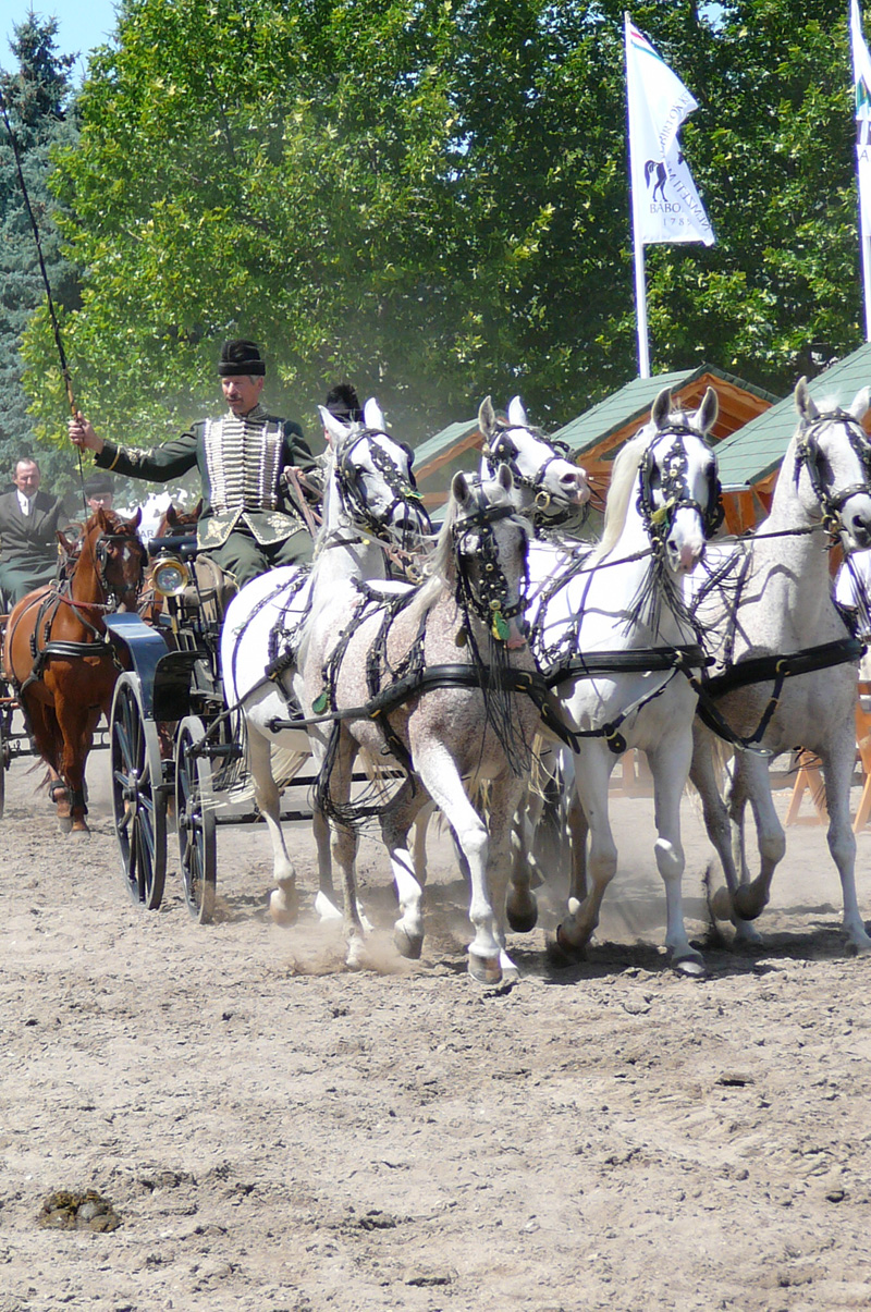 Un attelage traditionnel hongrois dit "en arbalète", attelé de 5 chevaux arabes shagya à la robe grise.